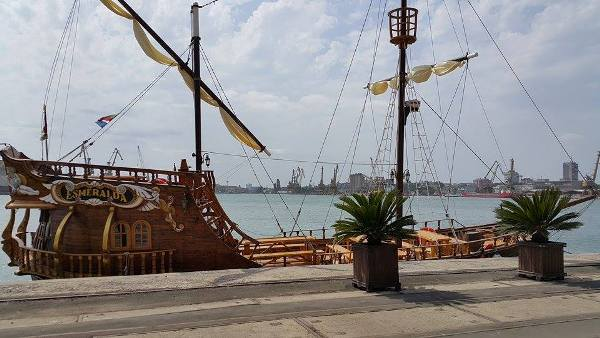 Пътнически кораб за разходки " Есмералда "